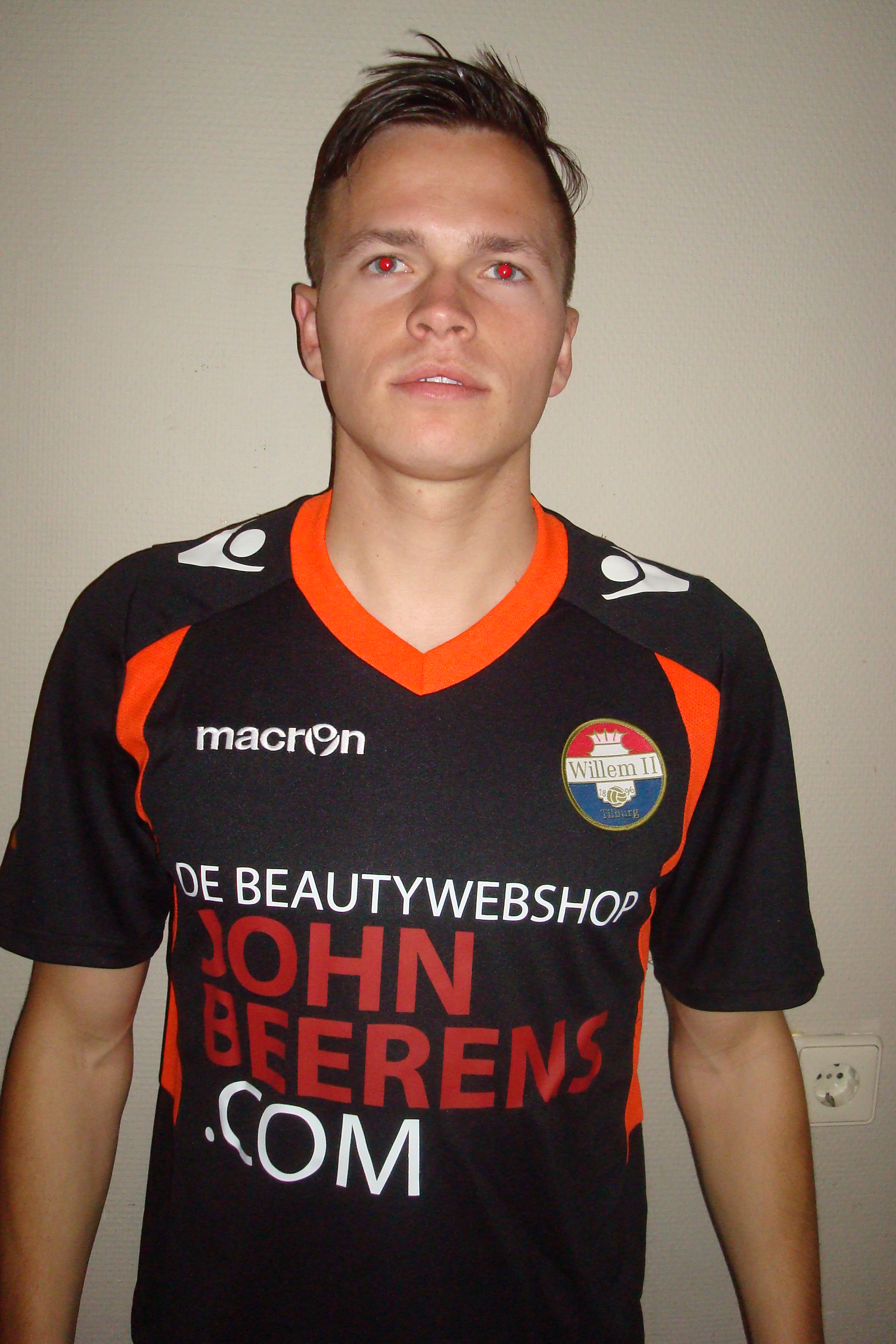 Mats van Huijgevoort in het shirt van Willem II seizoen 2013/2014